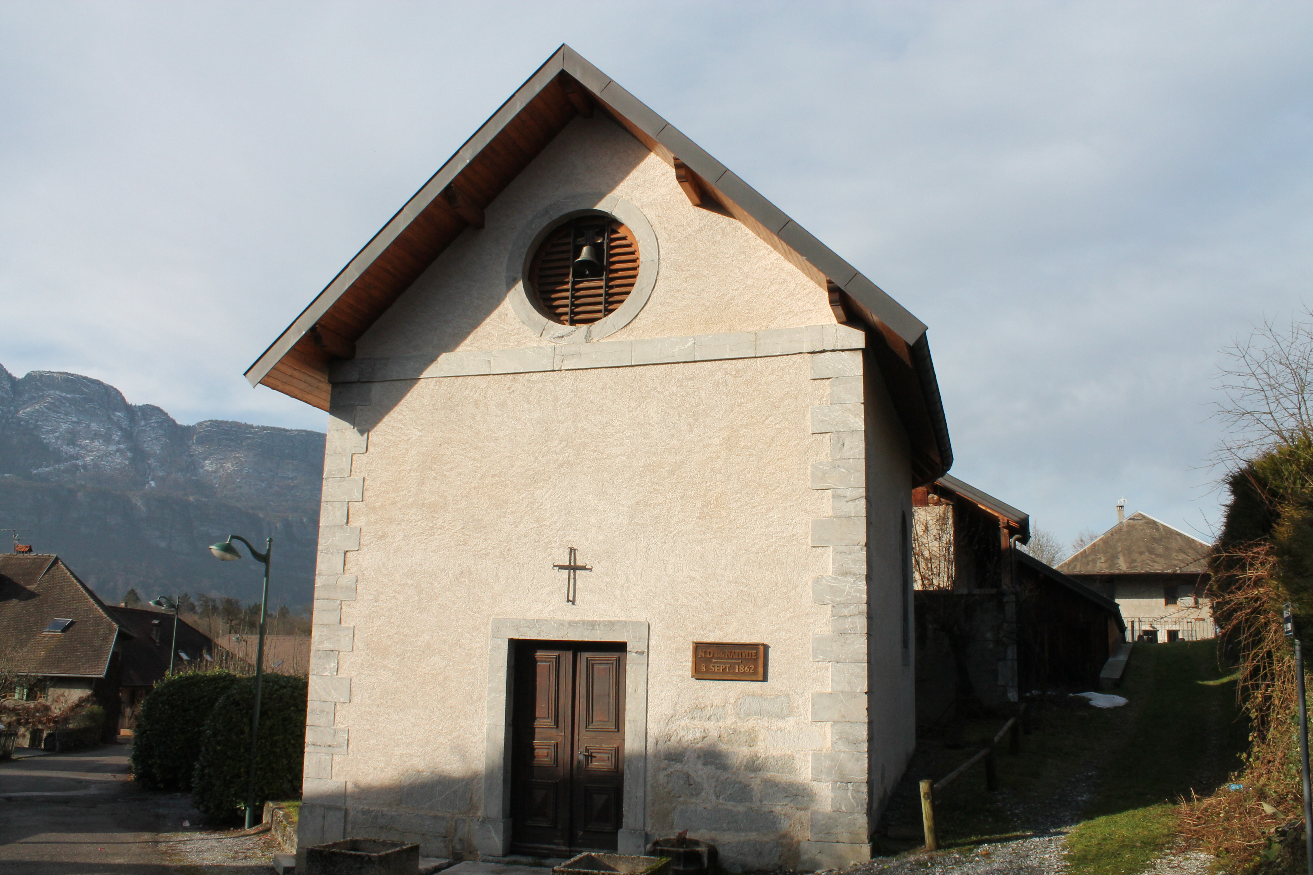 Chapelle de Notre-Dame de la Nativité de Verthier, façade